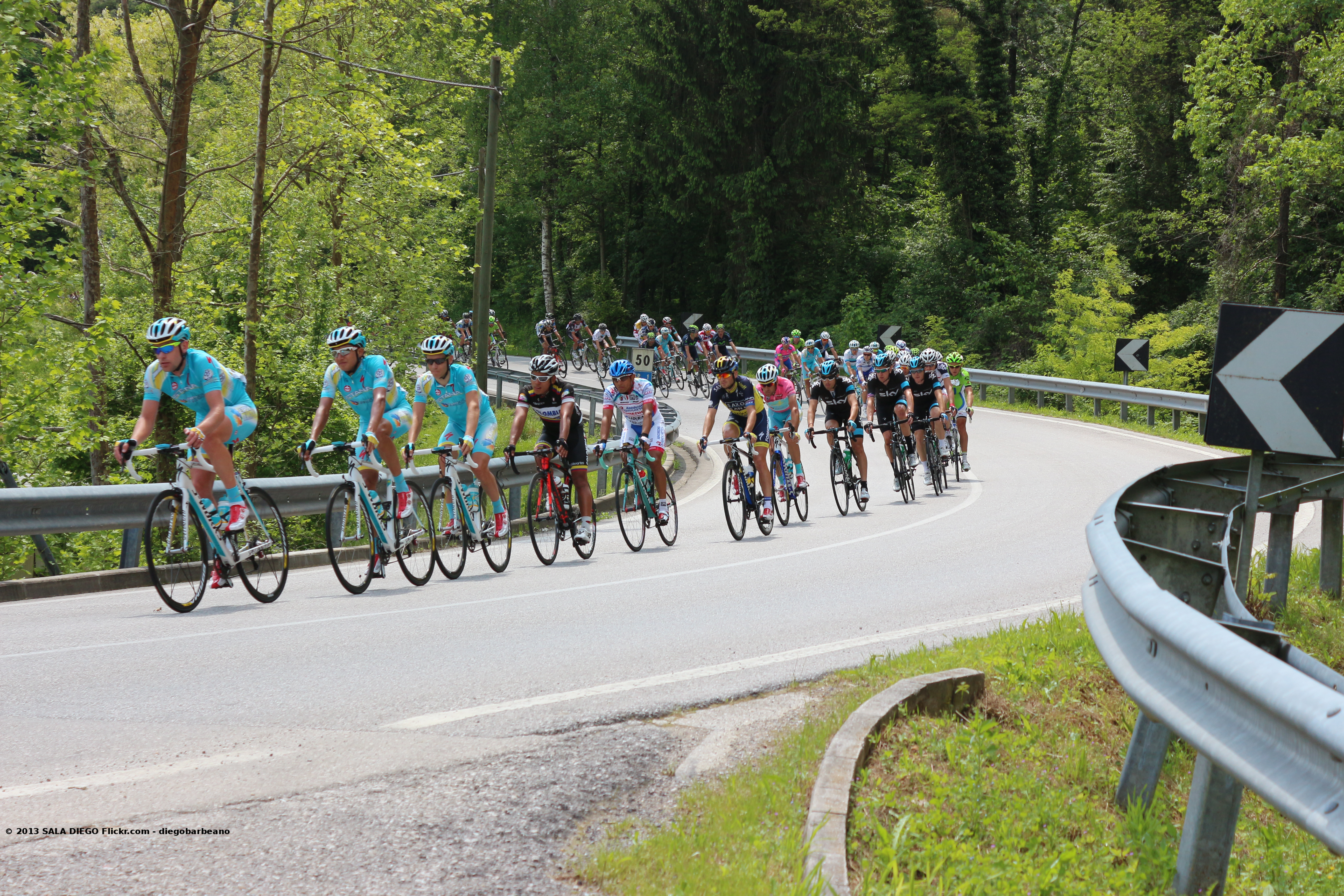 GIRO D ITALIA 2013